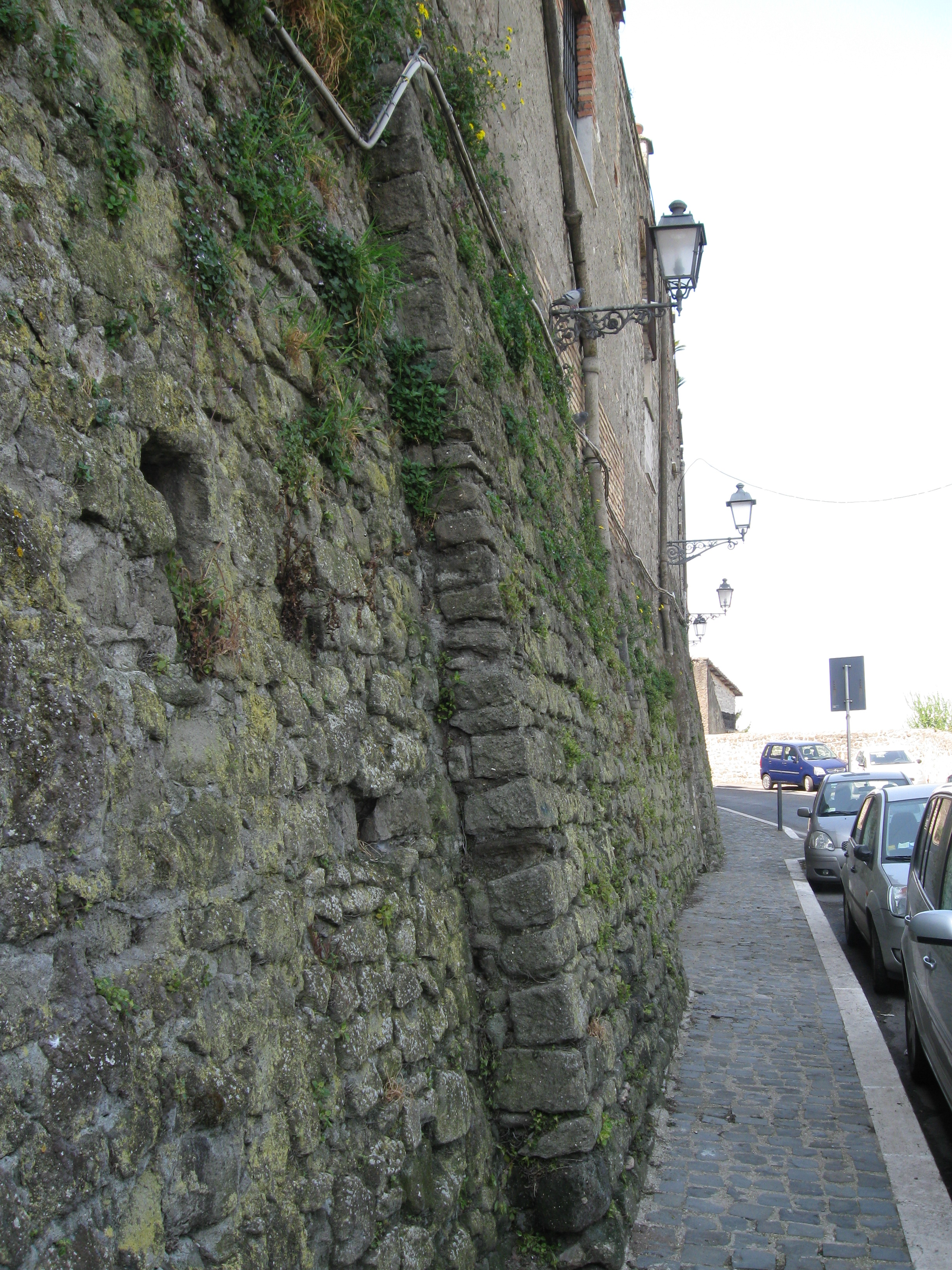 Mura di Marino (RM) - 02